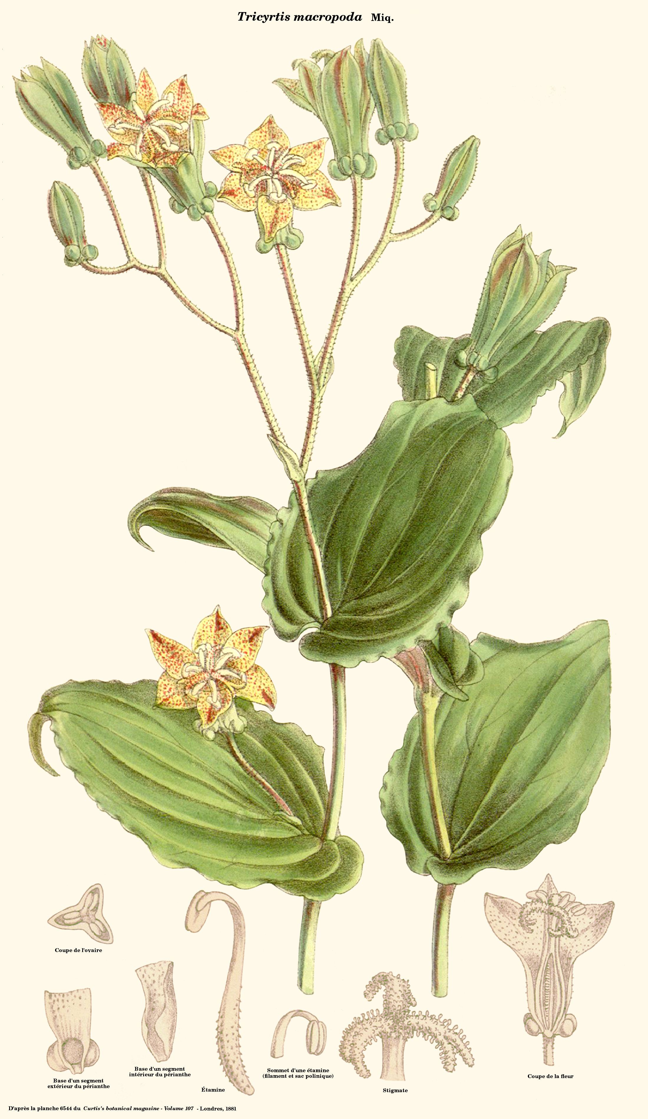 Tricyrtis macropoda - d'après la planche 6544 du volume 107 du Curtis's botanical magazine, Londres, 1881 - Planche reprise par D. Prévôt sous Gimp